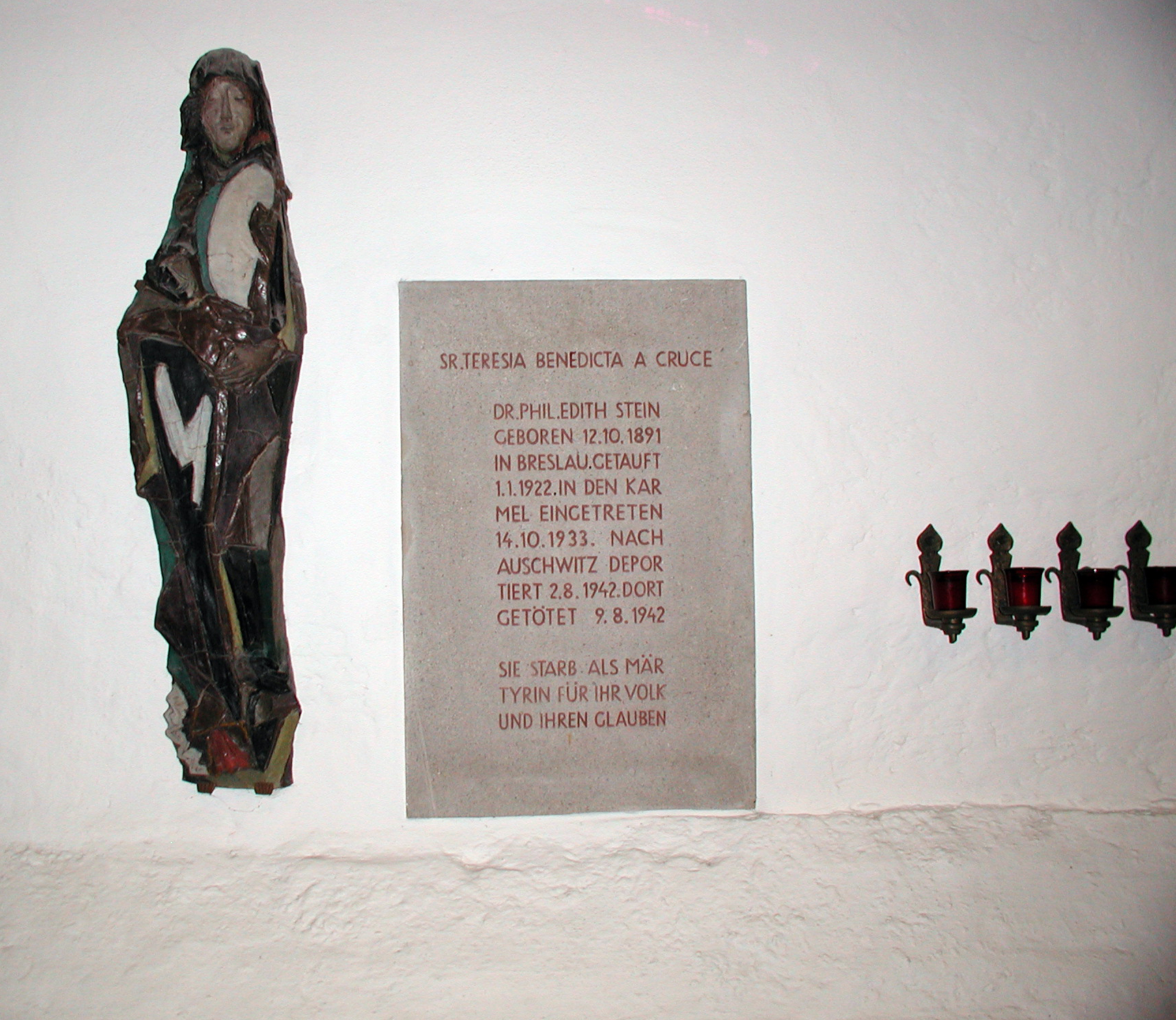 St. Maria vom Frieden, Köln